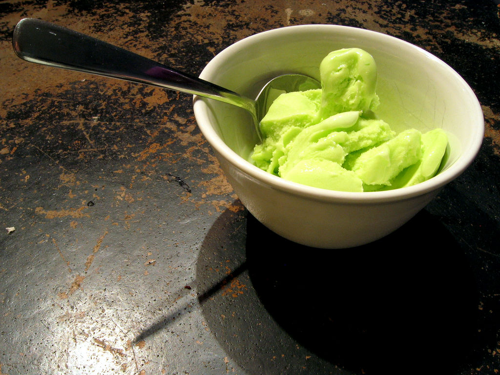 Lime sorbet